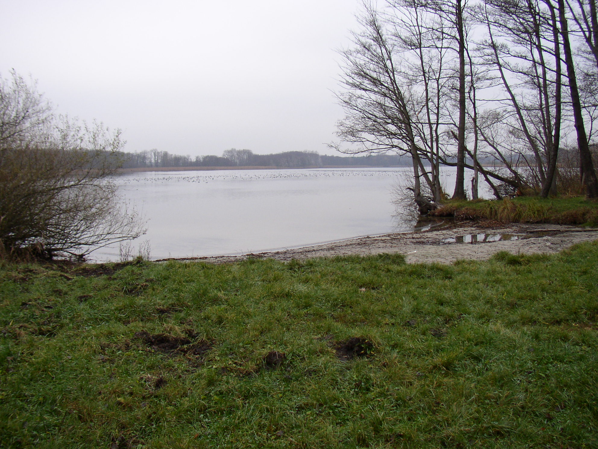 Am Plessower See, Westseite